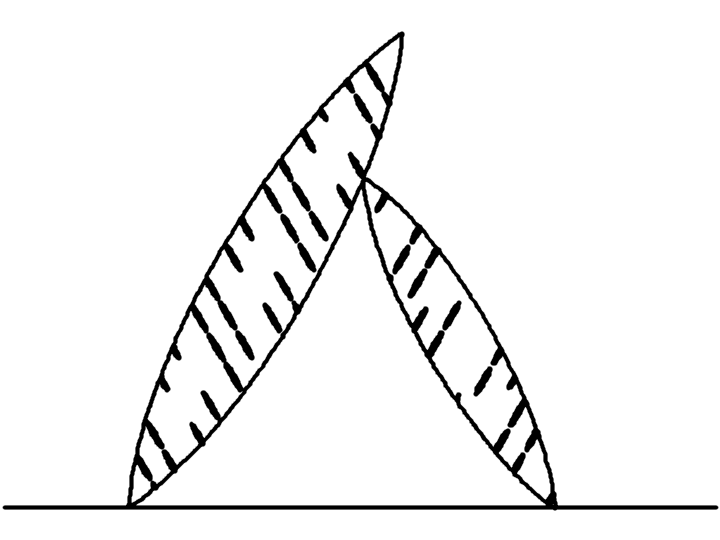 Bild 2.16 Schematische Darstellung der Karbidanordnung im unteren Bainit